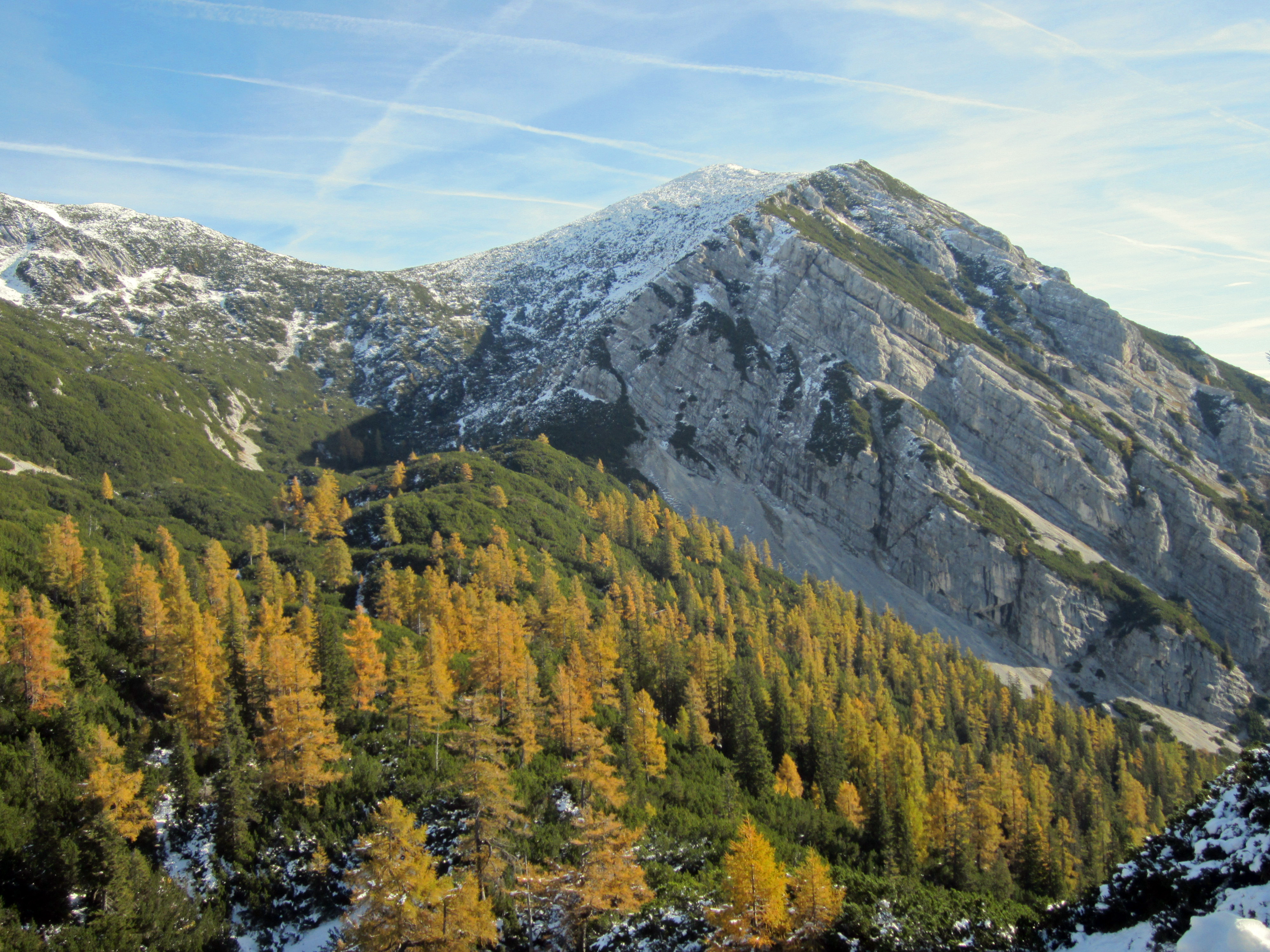 Blick vom Hagler auf die Westseite des Gamsplan, Links unten die Uvala der Knödelböden, Sengsengebirge, Österreich